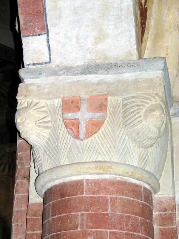 Asti, Chiesa di Santa Maria di Viatosto: interno, dettaglio volta gotica.